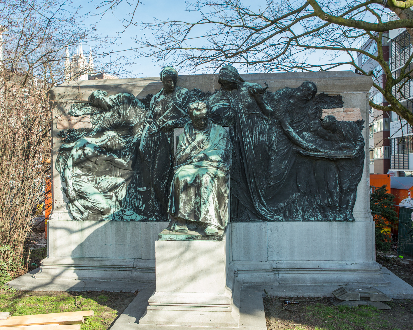 François Laurentplein met het standbeeld voor François Laurent